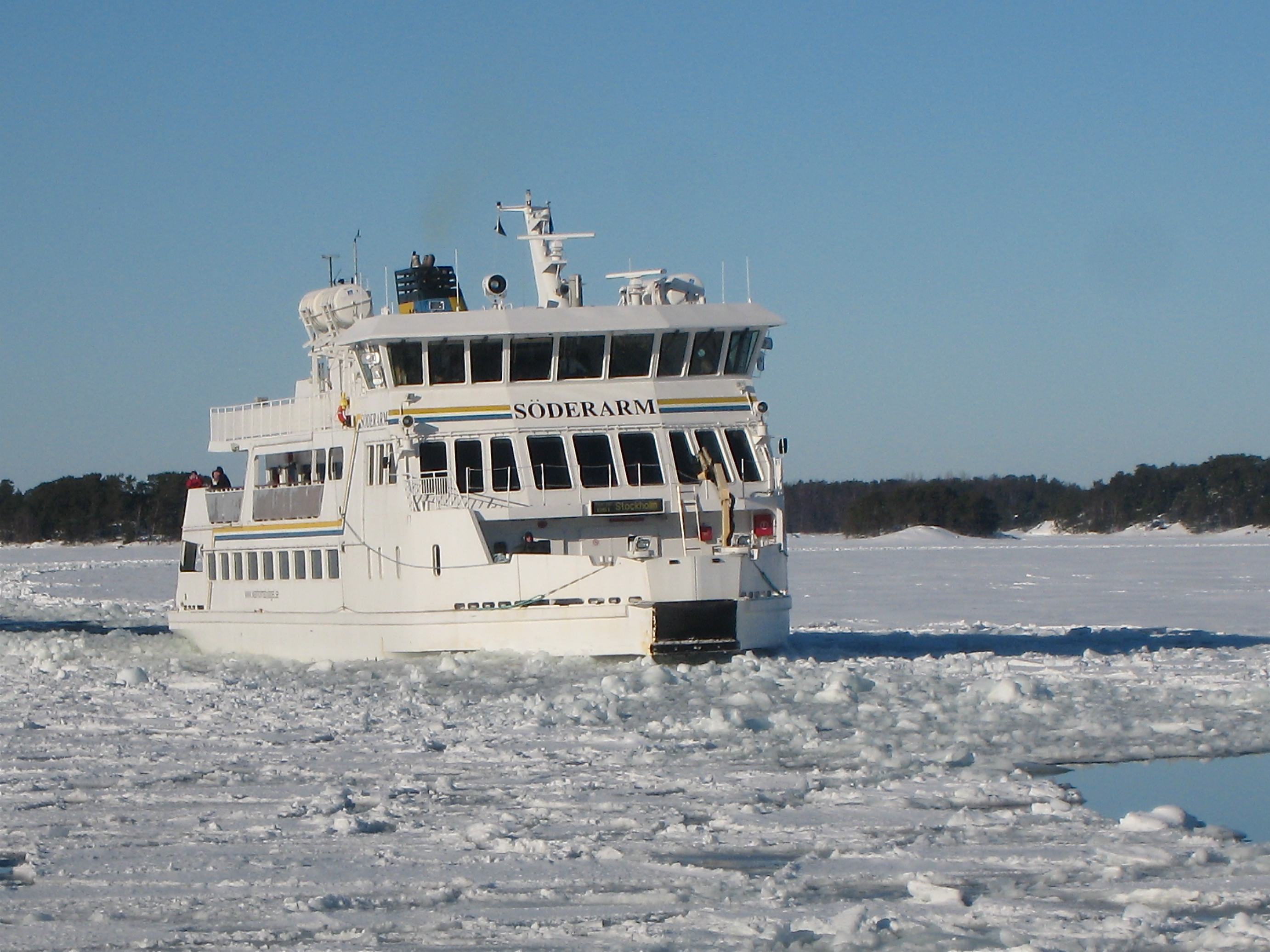 Söderarm, outside Finnhamn in mars 2010.